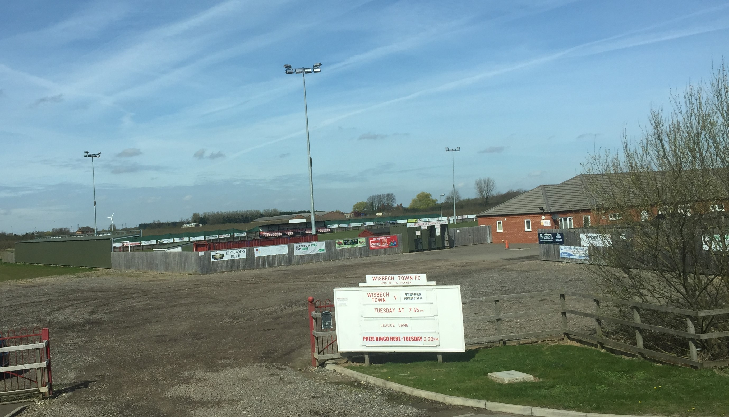 Wisbech Town FC Naujas Stadionas